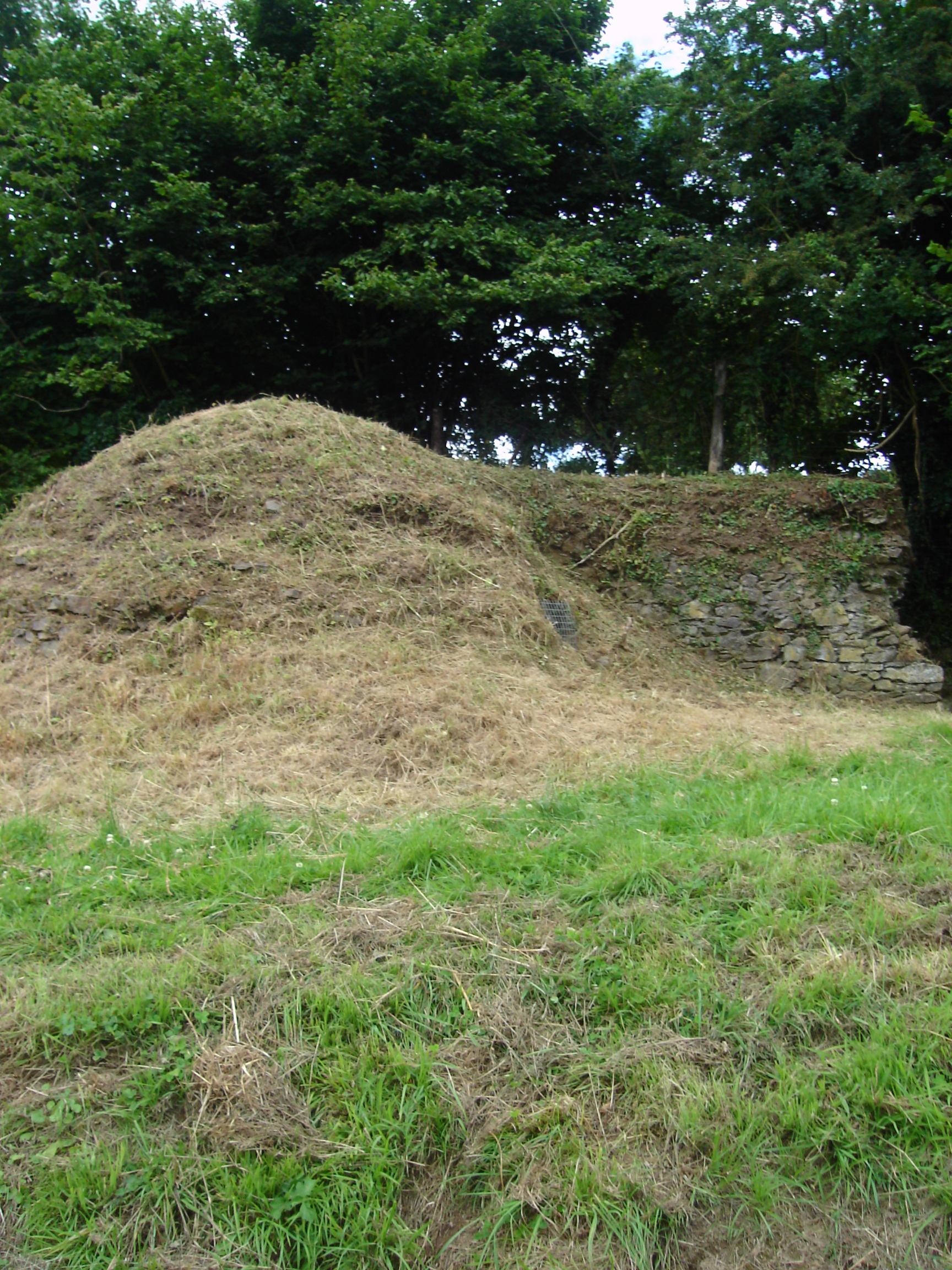 Photo de la glacière du Parc Medieval de l'êvèque à Coutances.